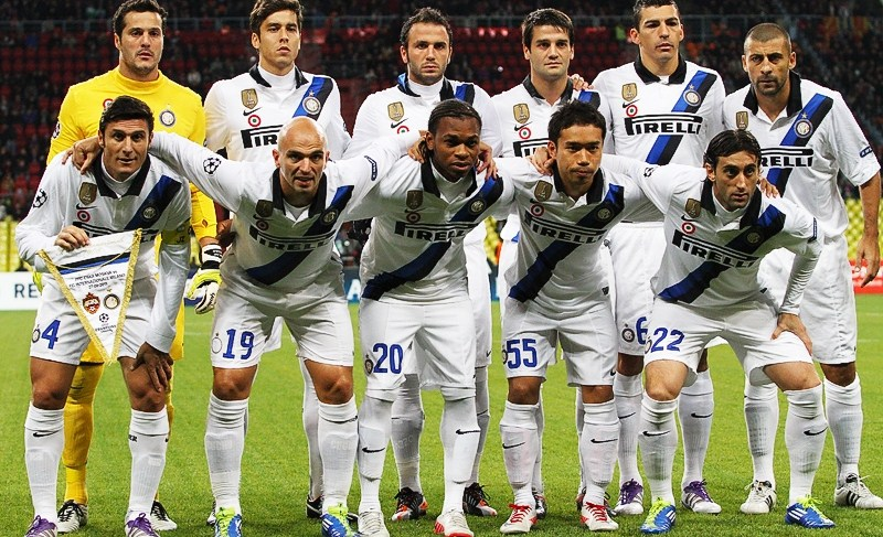 FC Internazionale 2011-2012